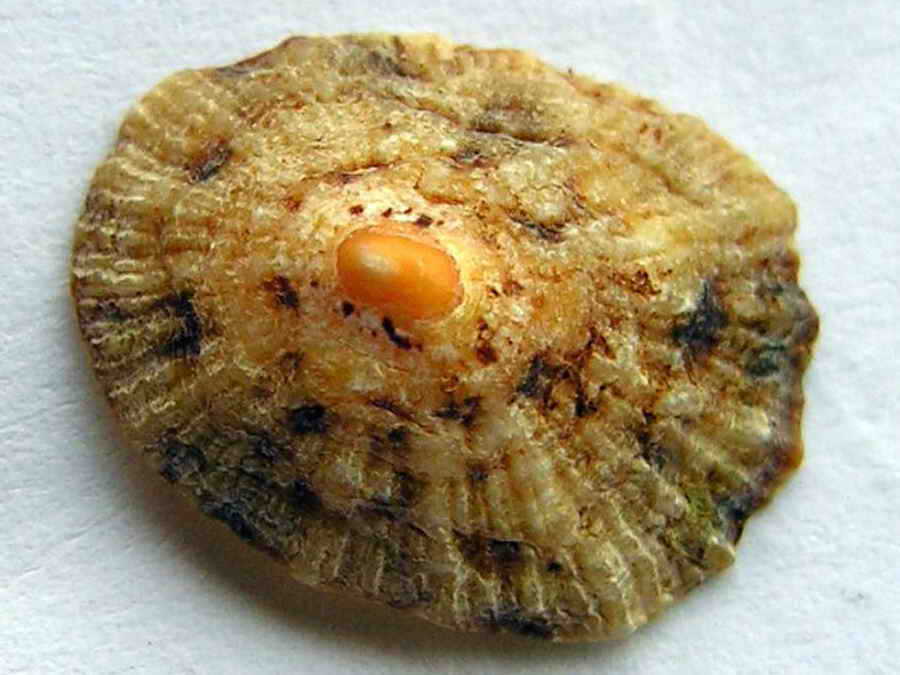 Foto tirada cunha Nikon E8800